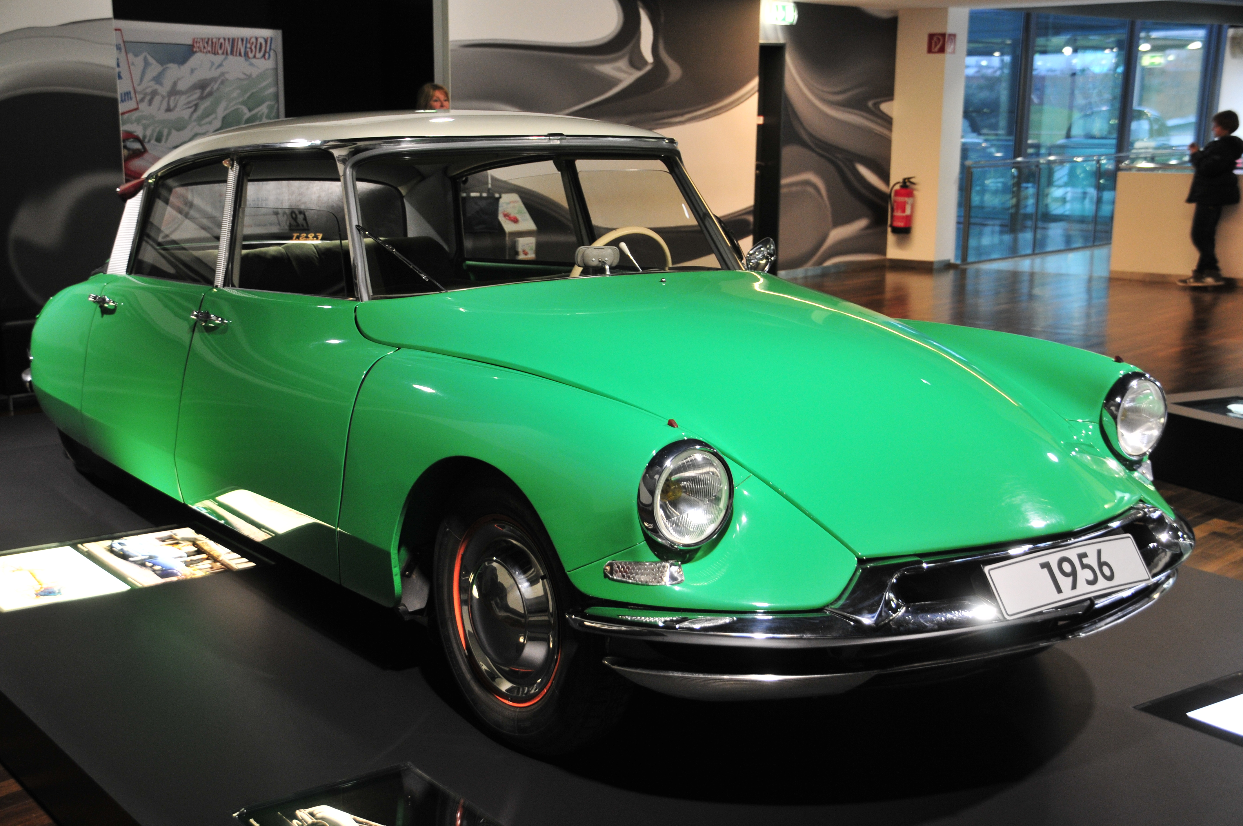 Fahrzeug in der Autostadt Wolfsburg